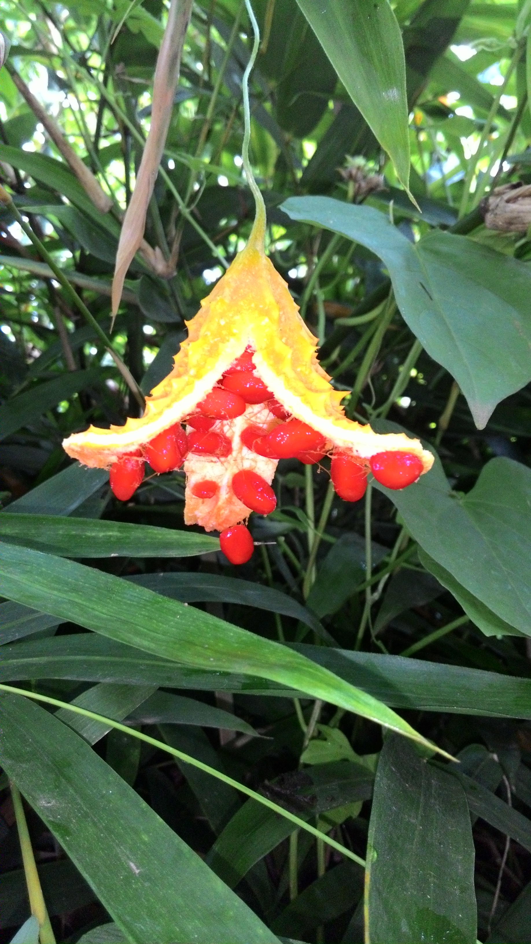 Paria atau pare kecil merupakan tumbuhan merambat yang termasuk tanaman herbal. Ukurannya lebih kecil dari Pare biasanya. Saat muda warnanya hijau dan ketika masak warnanya kuning atau orange. Saat masak, Pare kecil atau pare hutan ini akan merekah membuka cangkangnya dan terlihat biji-biji merah menyala yang dapat dikonsumsi karena rasanya manis. Tanaman liar yang mudah tumbuh ini sangat bermanfaat. Bijinya menagndung MAP 30 ( momordica antiviral protein 30) sebagai antikanker dan mencegah penuaan dini.